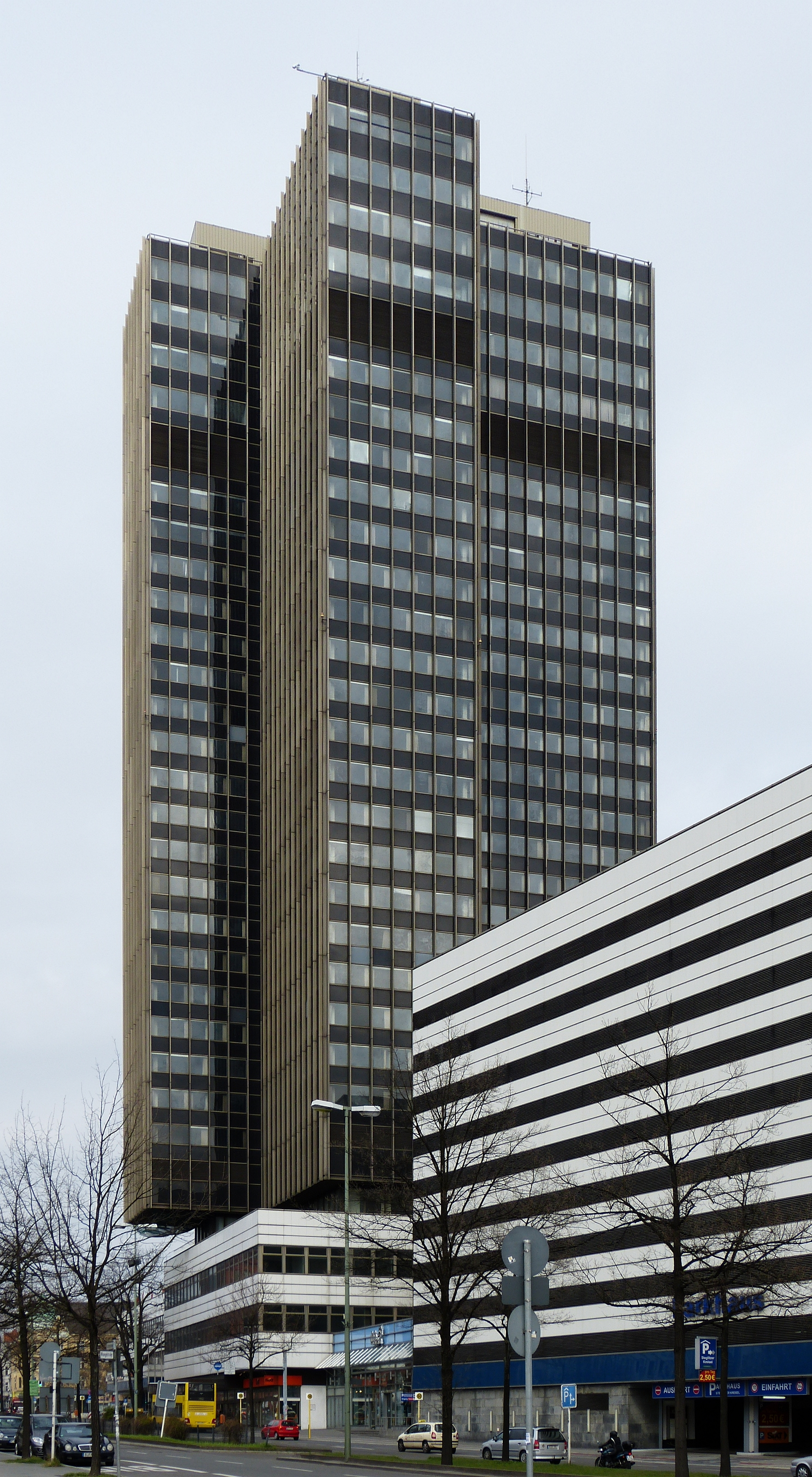 Berlin-Steglitz, Schloßstraße, Hochhaus "Steglitzer Kreisel"